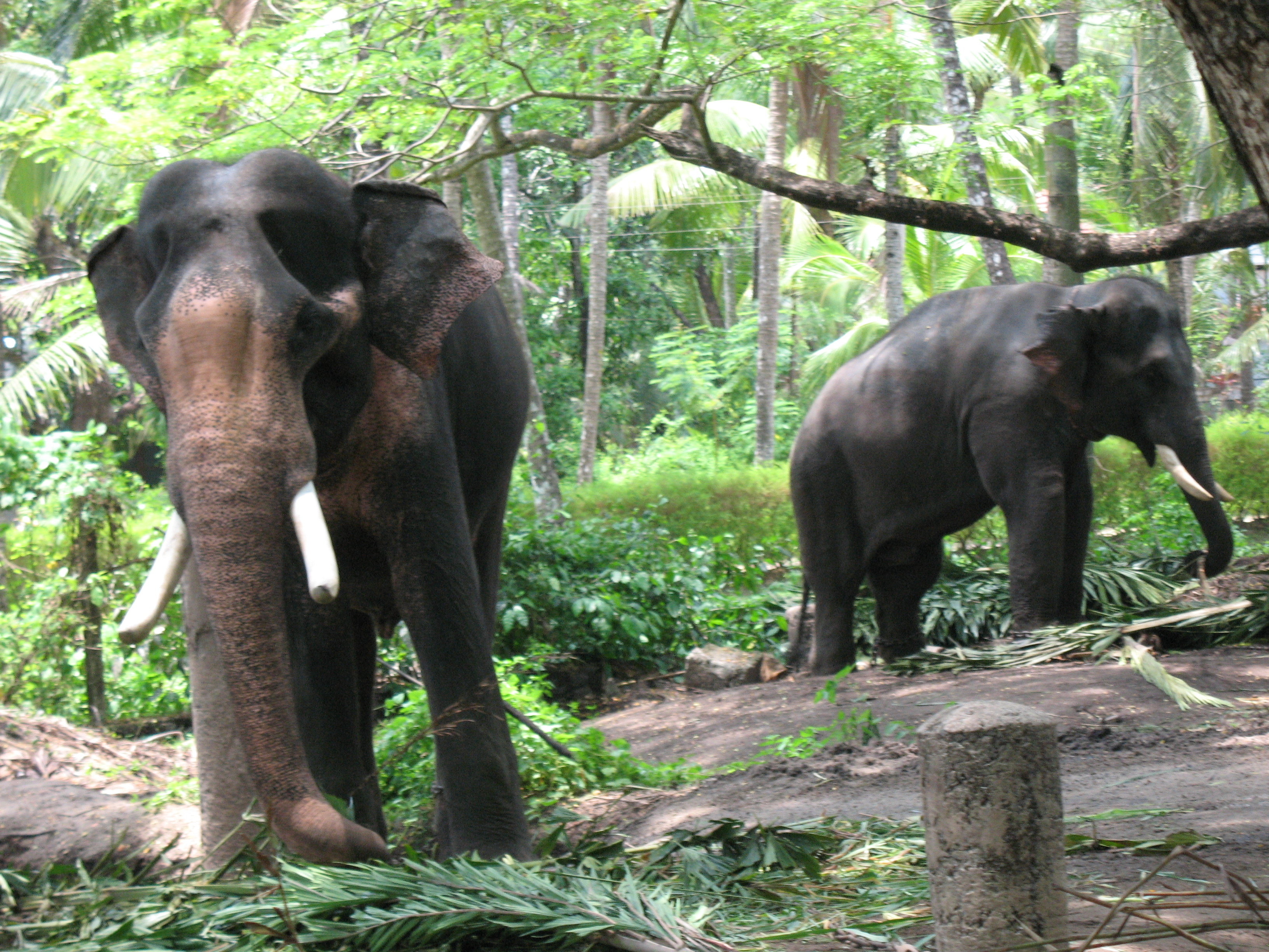 Elephant fort photographed by by. Sujay S.